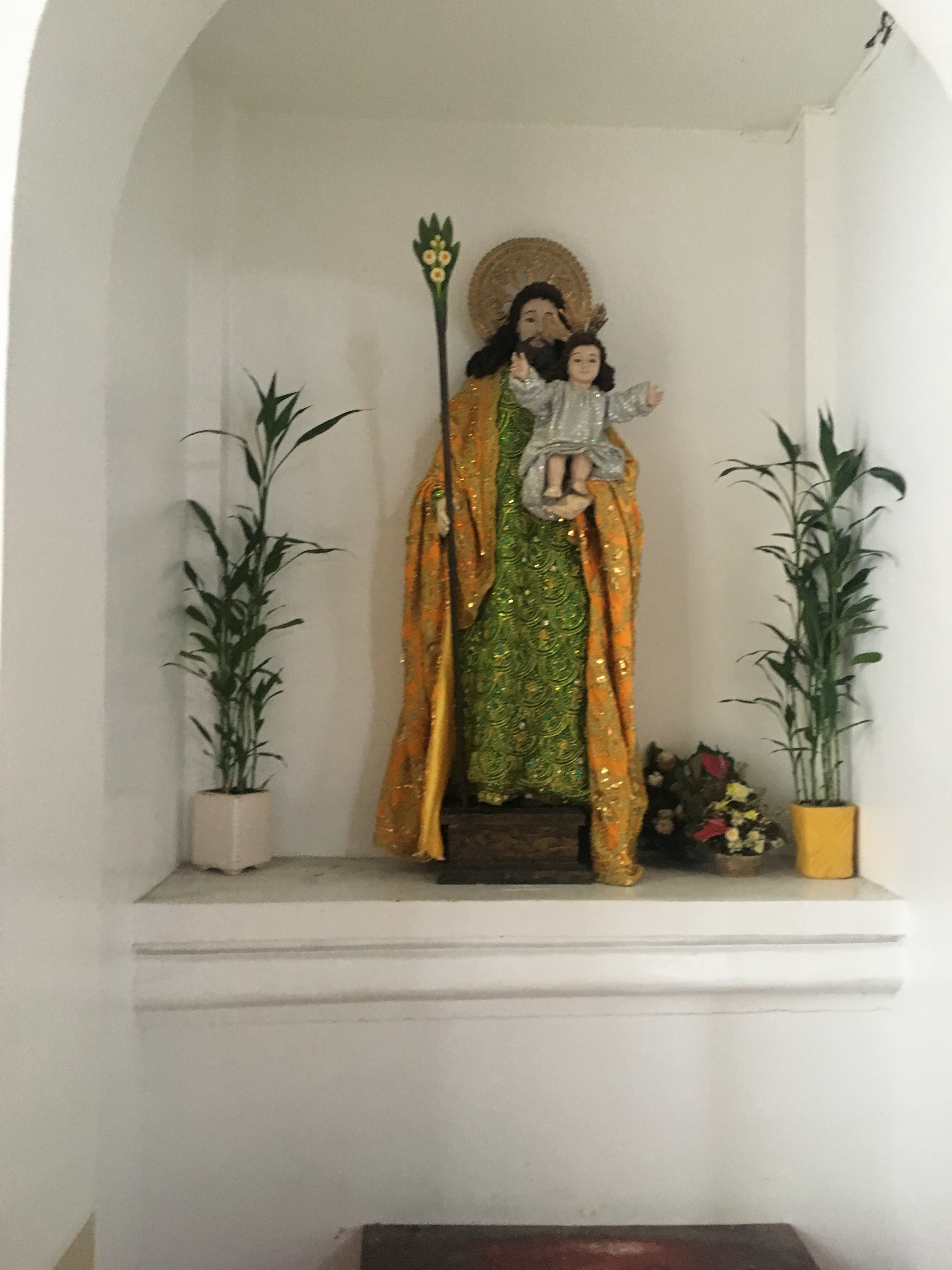 菲律賓教堂的聖嬰像